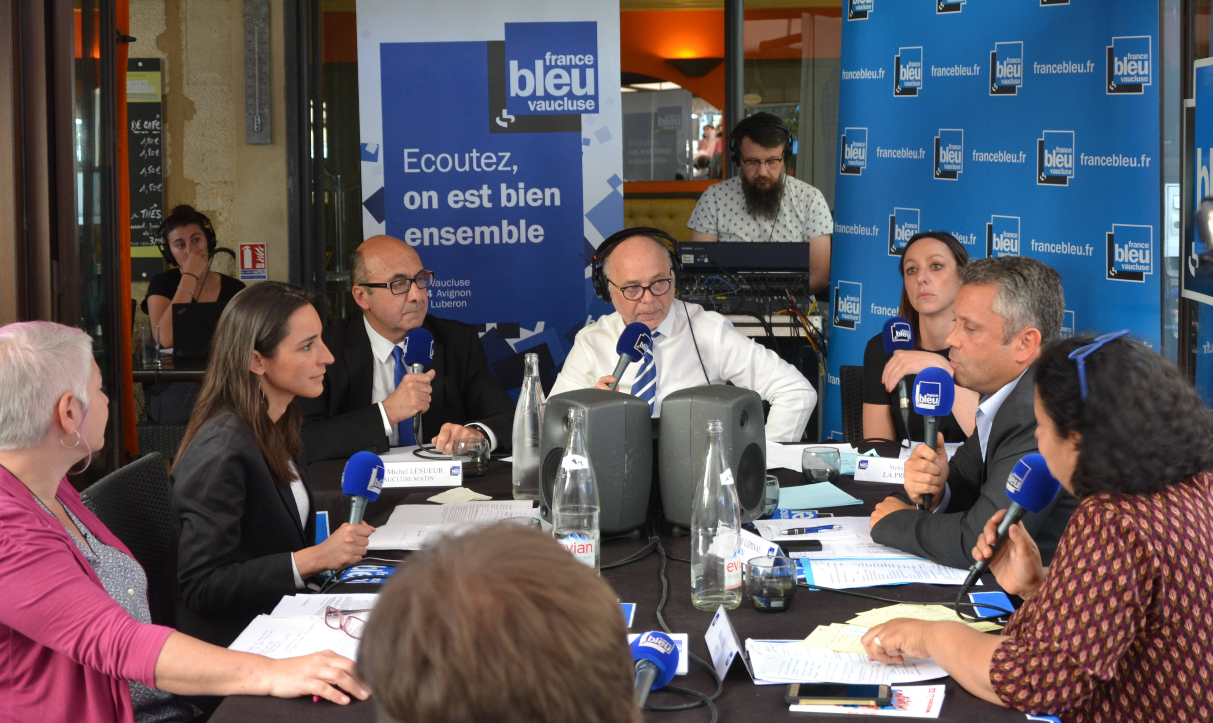 Débat public de la radio France Bleue Vaucluse à Carpentras, pour les élection législative 2017, 3ème circonscription de Vancluse